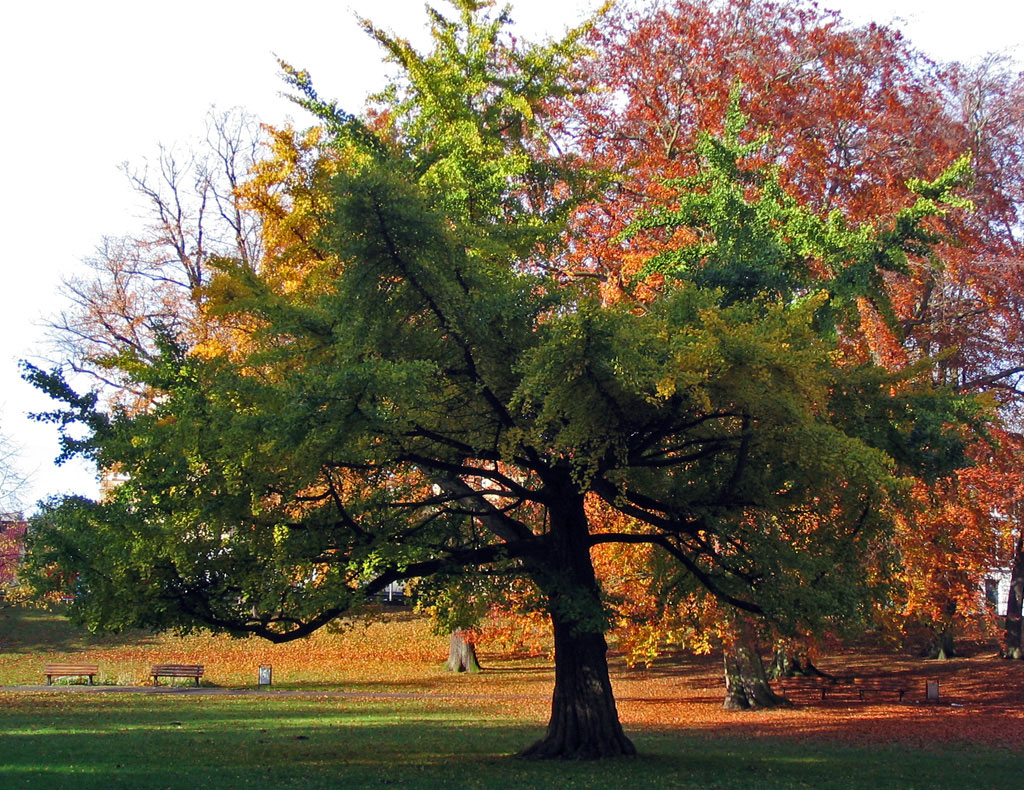 E Ginkgo